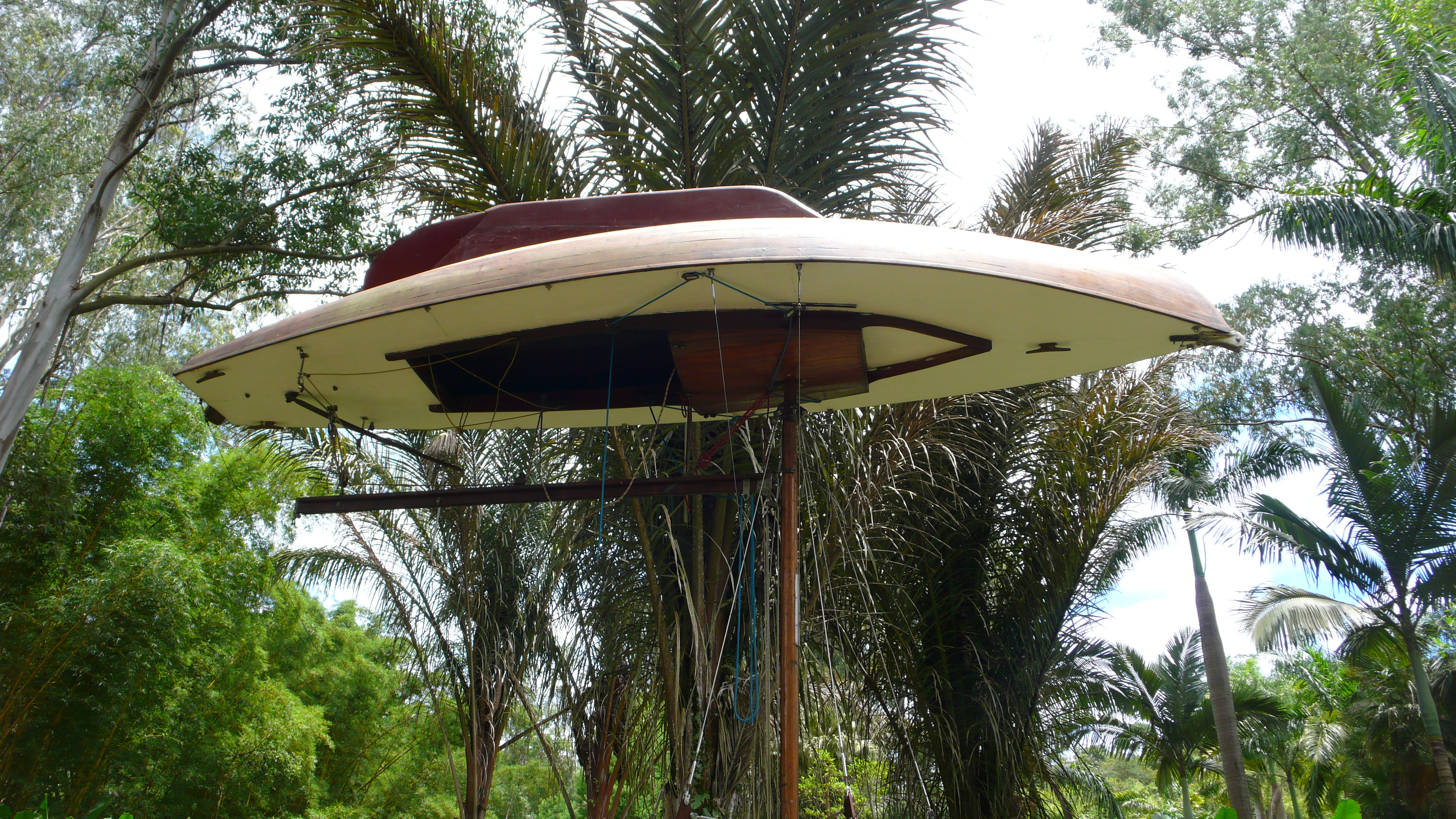 The Mahogany Pavillion (Mobile Architecture No.1), 2004, by Simon Starling. Inhotim, Brumadinho, Brazil. Veleiro "loch long" invertido (no.73) construído em 1963 pela Boags Boat Yard, Escócia, usando mogno sul-americano, 640 x 600 x 350 cm.